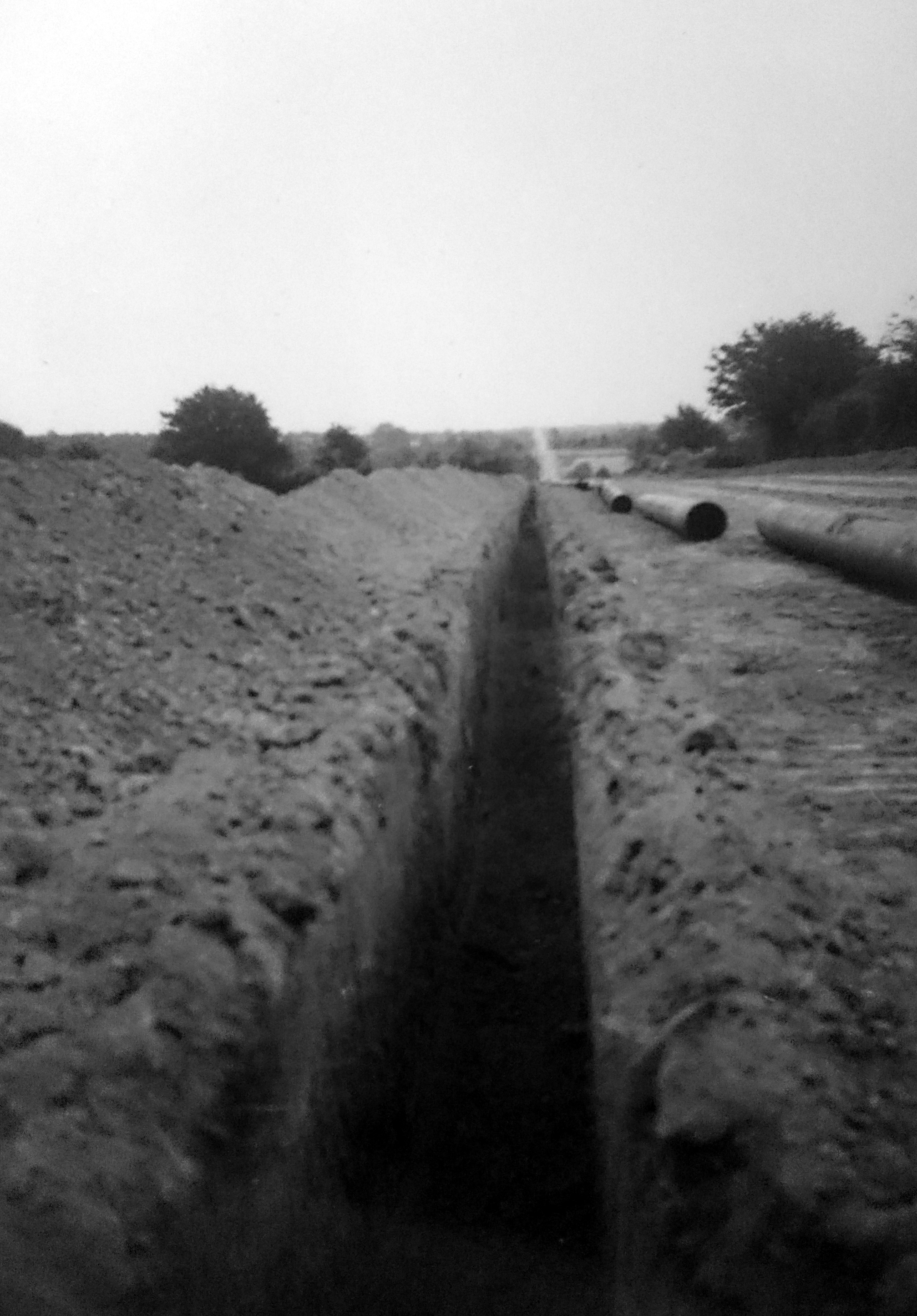 Construction du pipeline de Donges à Metz à Les Touches.